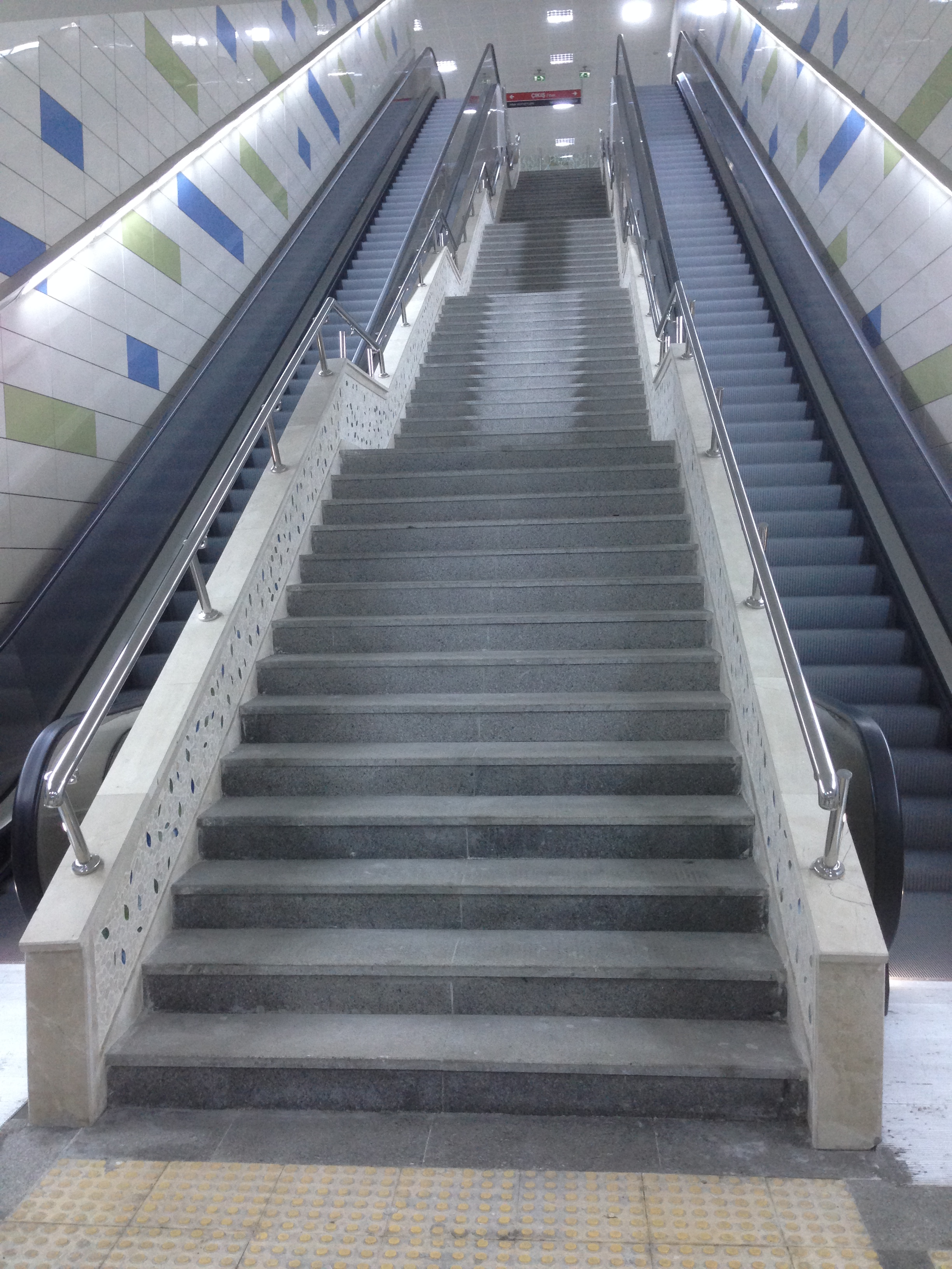 Çayyolu Metrosu